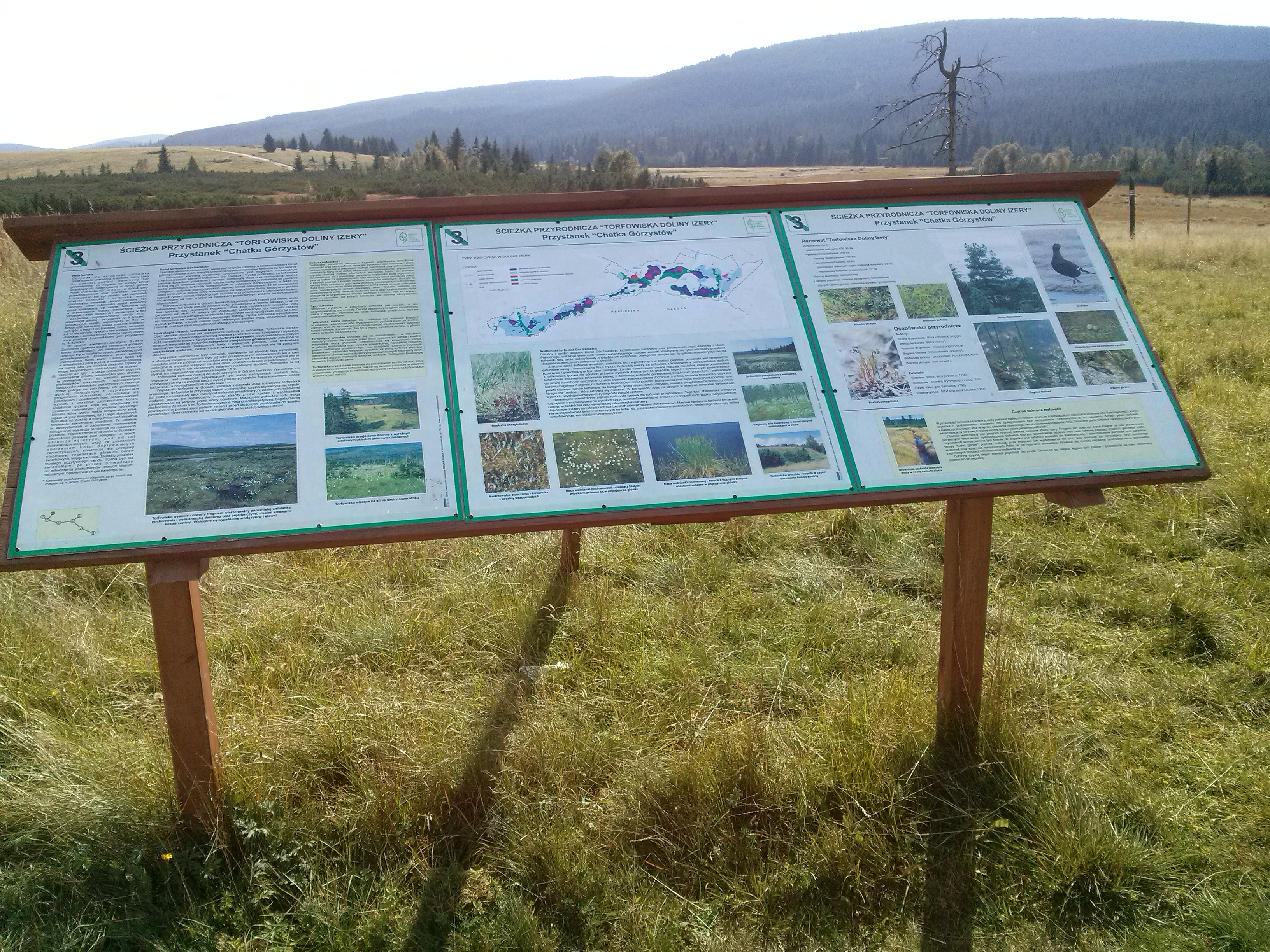 Tablica informacyjna ścieżki przyrodniczej "Torfowiska Doliny Izery", przystanek "Chatka Górzystów"